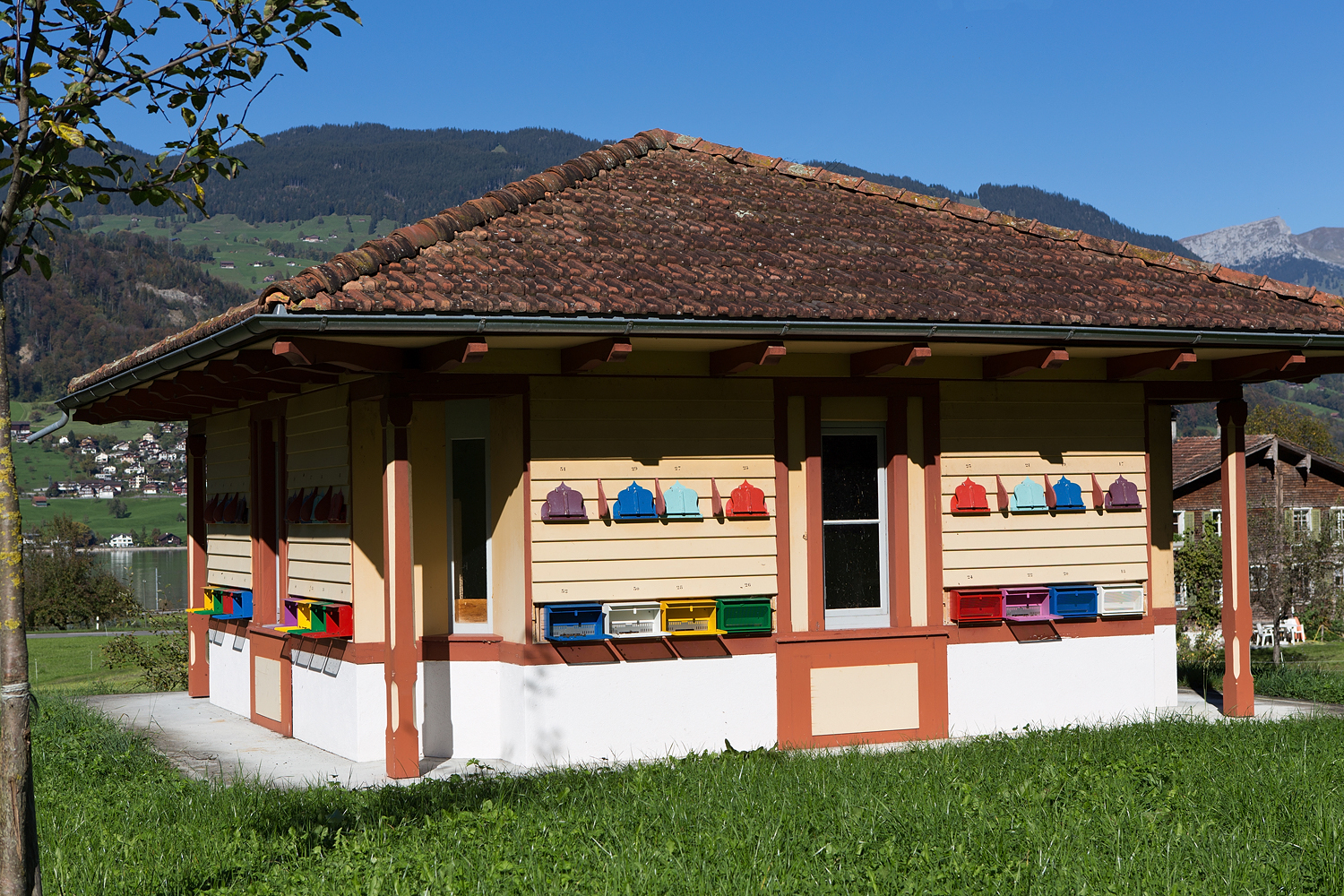 Bienenhaus in der Kreuzmatte, Sachseln